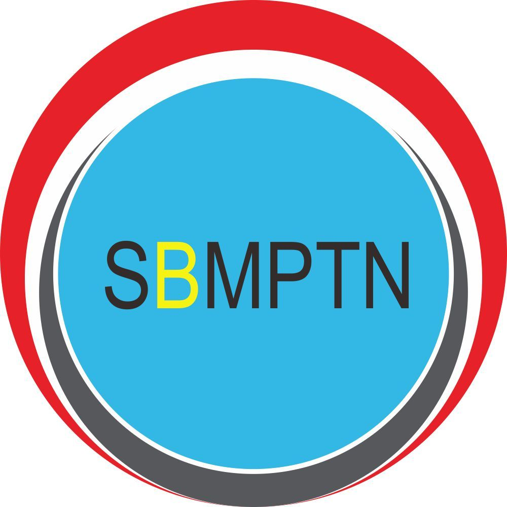 Logo untuk sbmptn